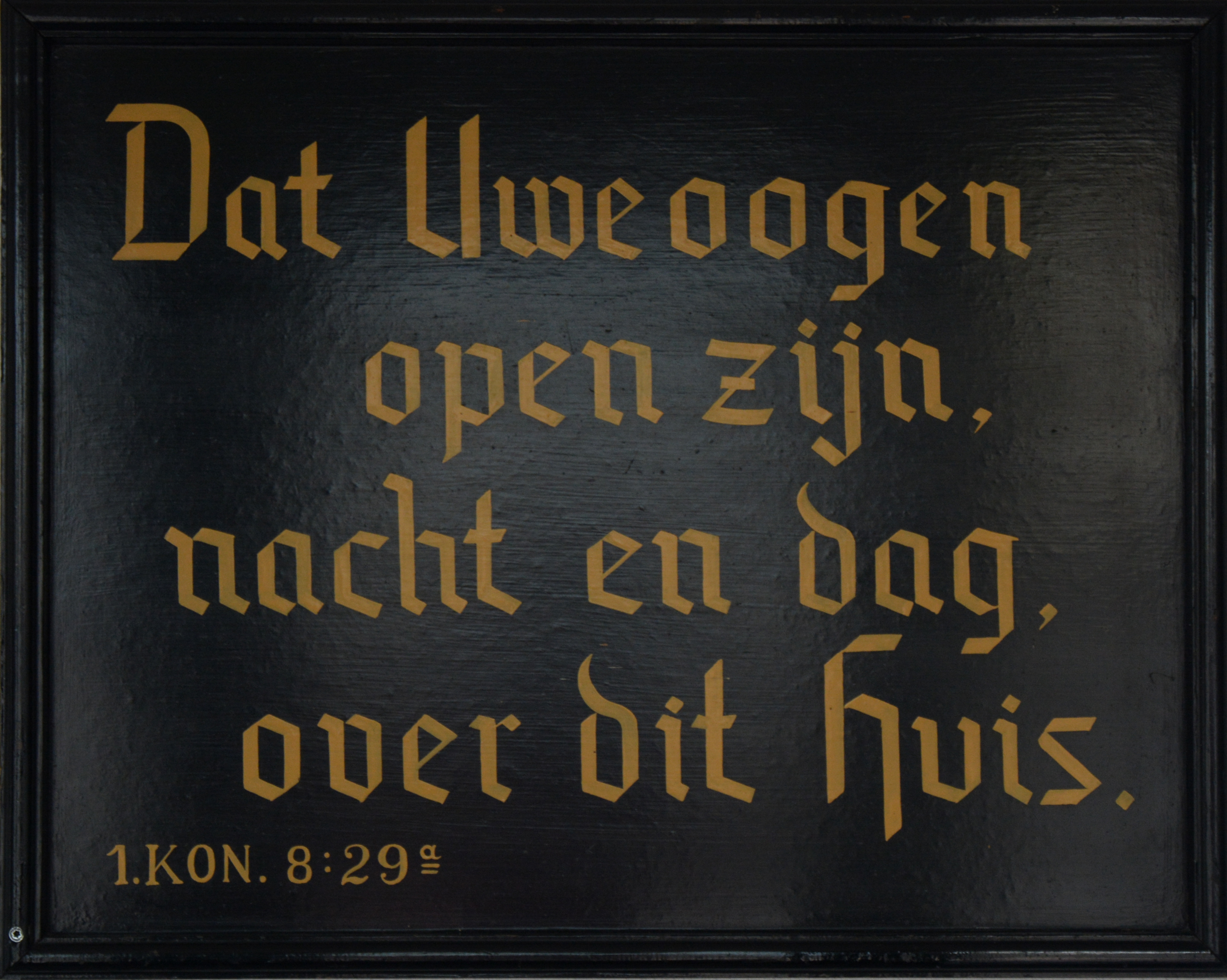 Damwoude, de christelijke gereformeerde kerk van de Andreasgemeente van Broeksterwoude, tekstbord